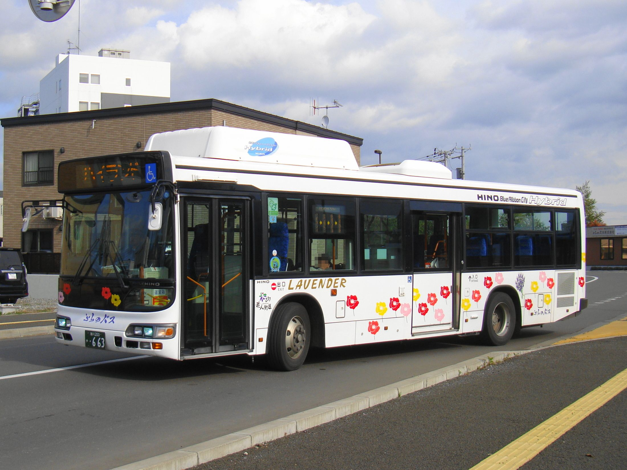 Furano city line